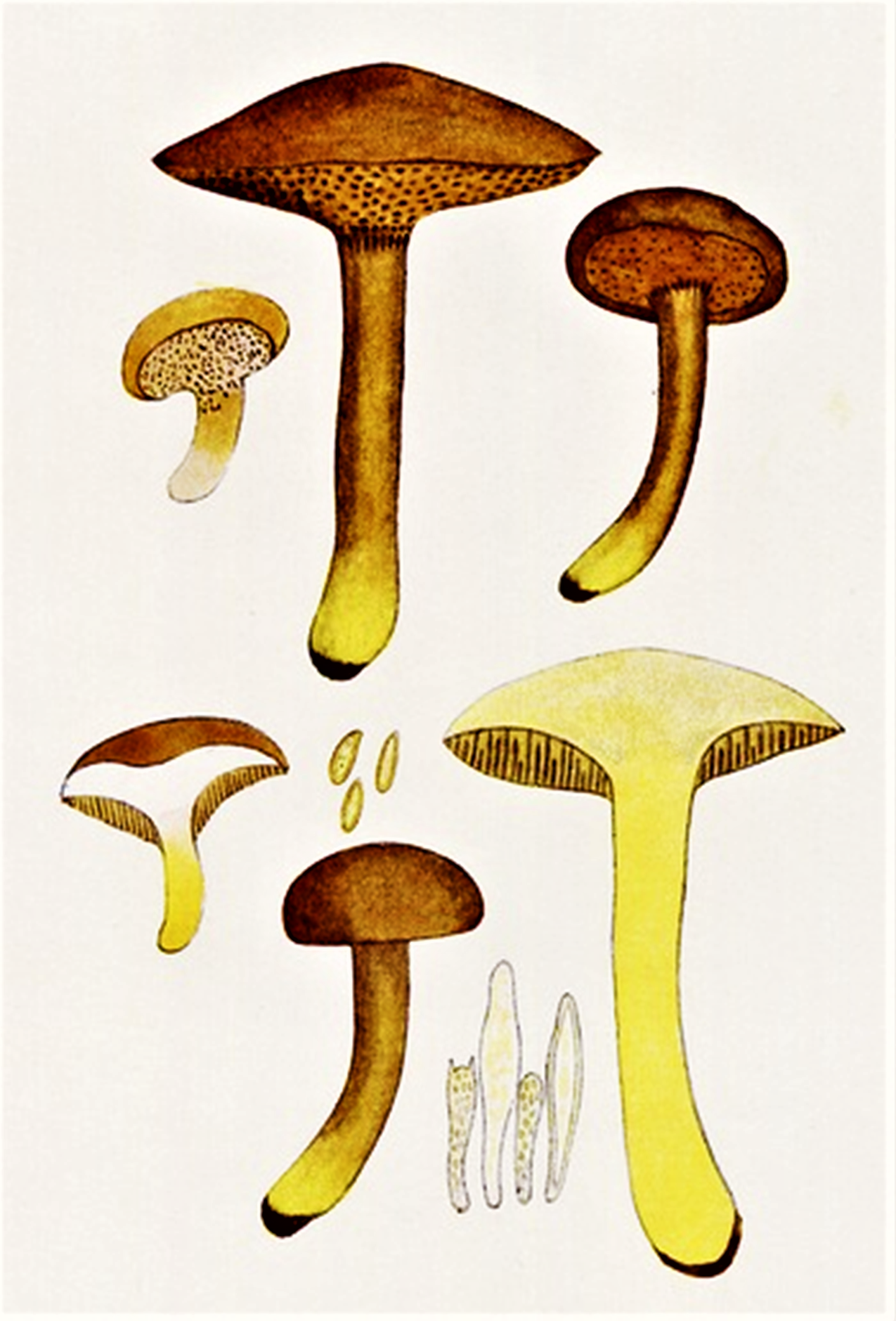 Giacomo Bresadola: Boletus piperatus Bull., 1790), heute Chalciporus piperatus (Bull.) Bataille (1908)